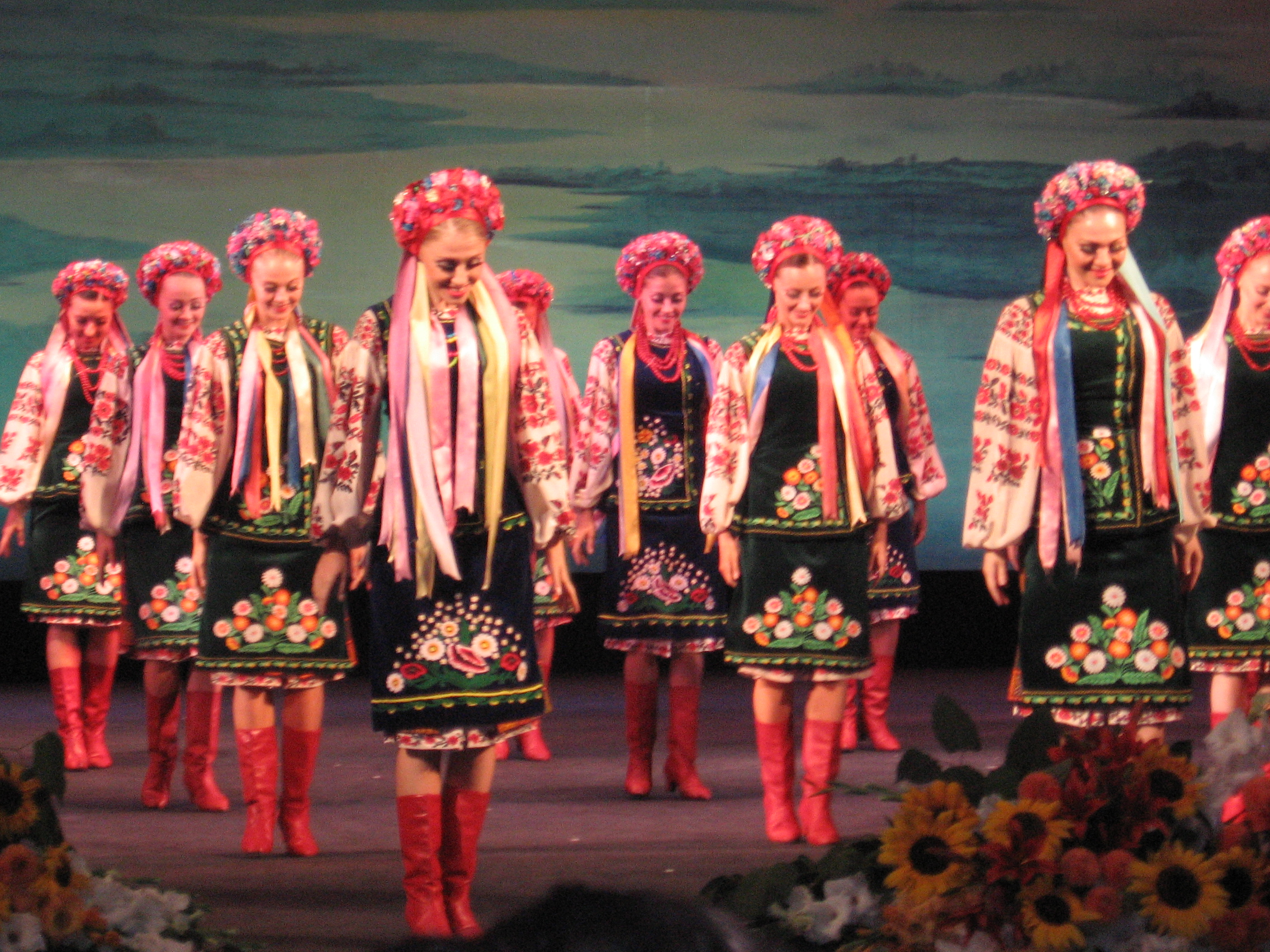 Форум 2011: Фото